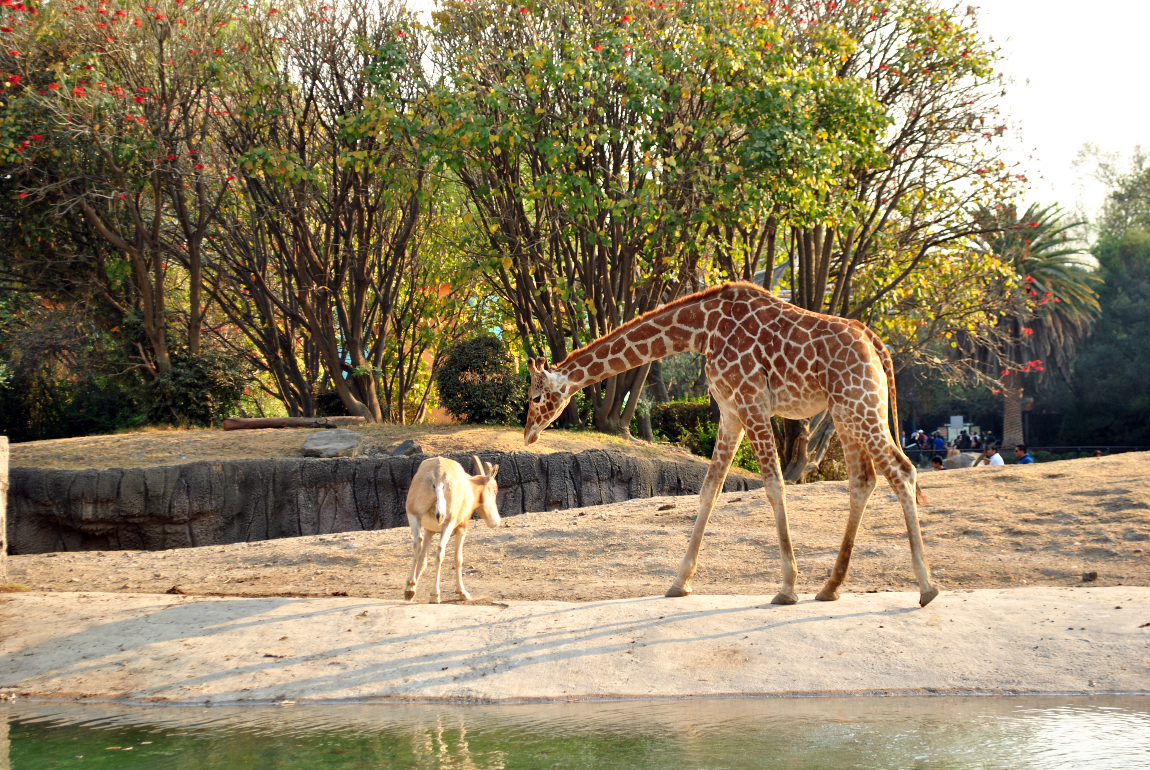 Bosque de Chapultepec primera sección